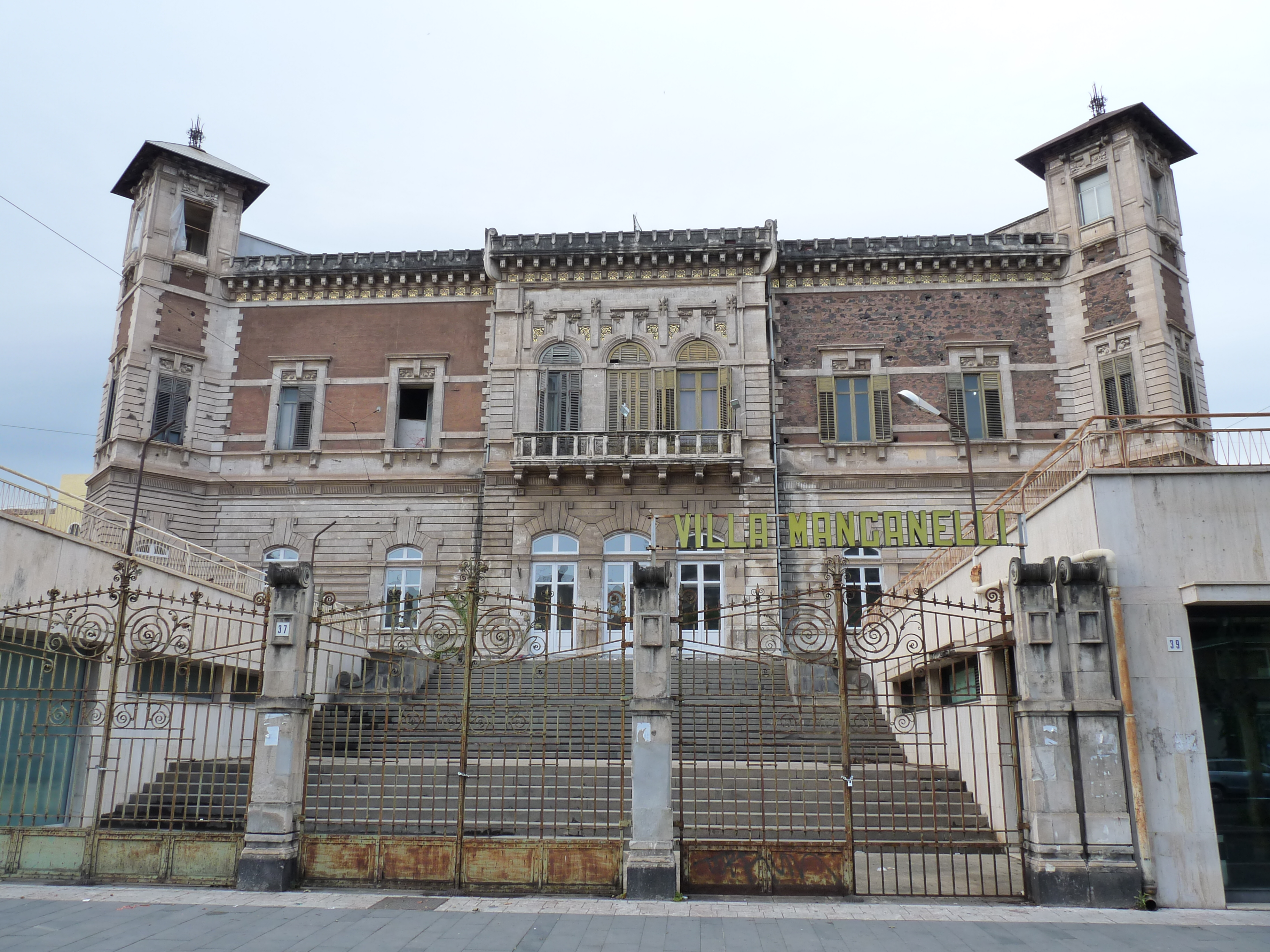 Villa Manganelli (Corso Italia, 37, Catane, Sicile, Italie). Architecte Ernesto Basile.